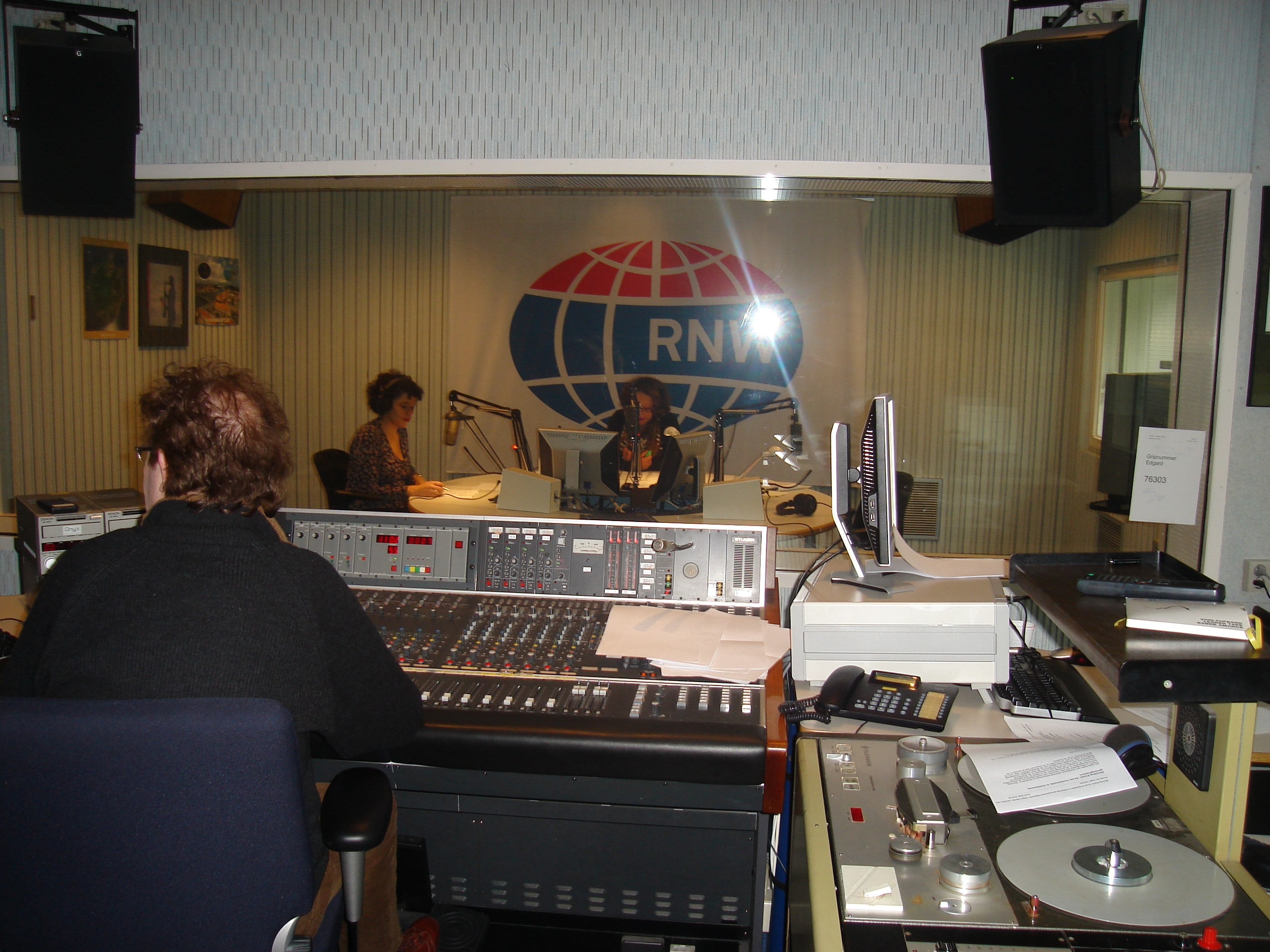 Radio Nederland Wereldomroep Studio أستديو إذاعة هولندا العالمية